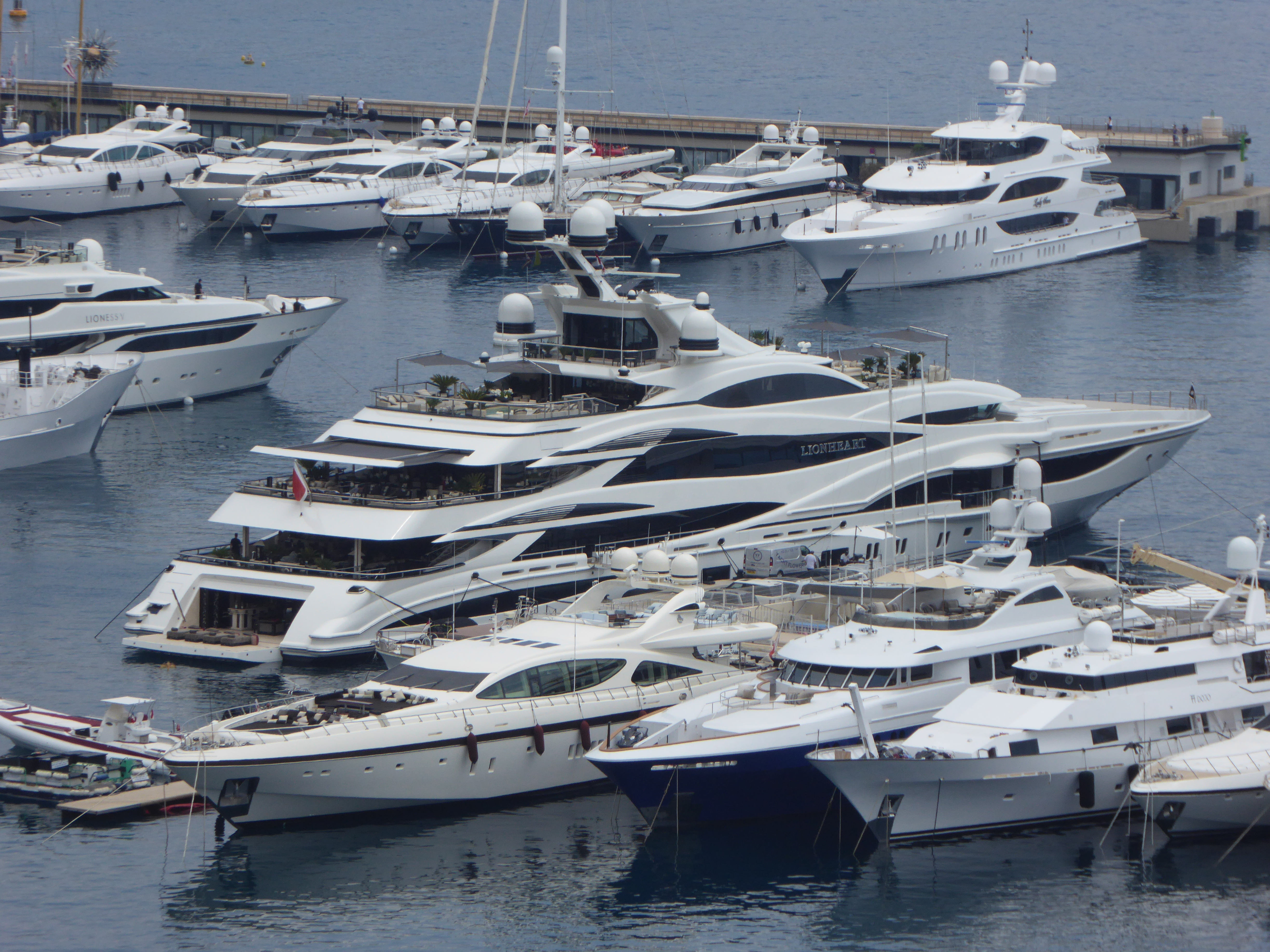 M/Y Lionheart Monaco 2017